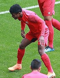 Oslimg Mora